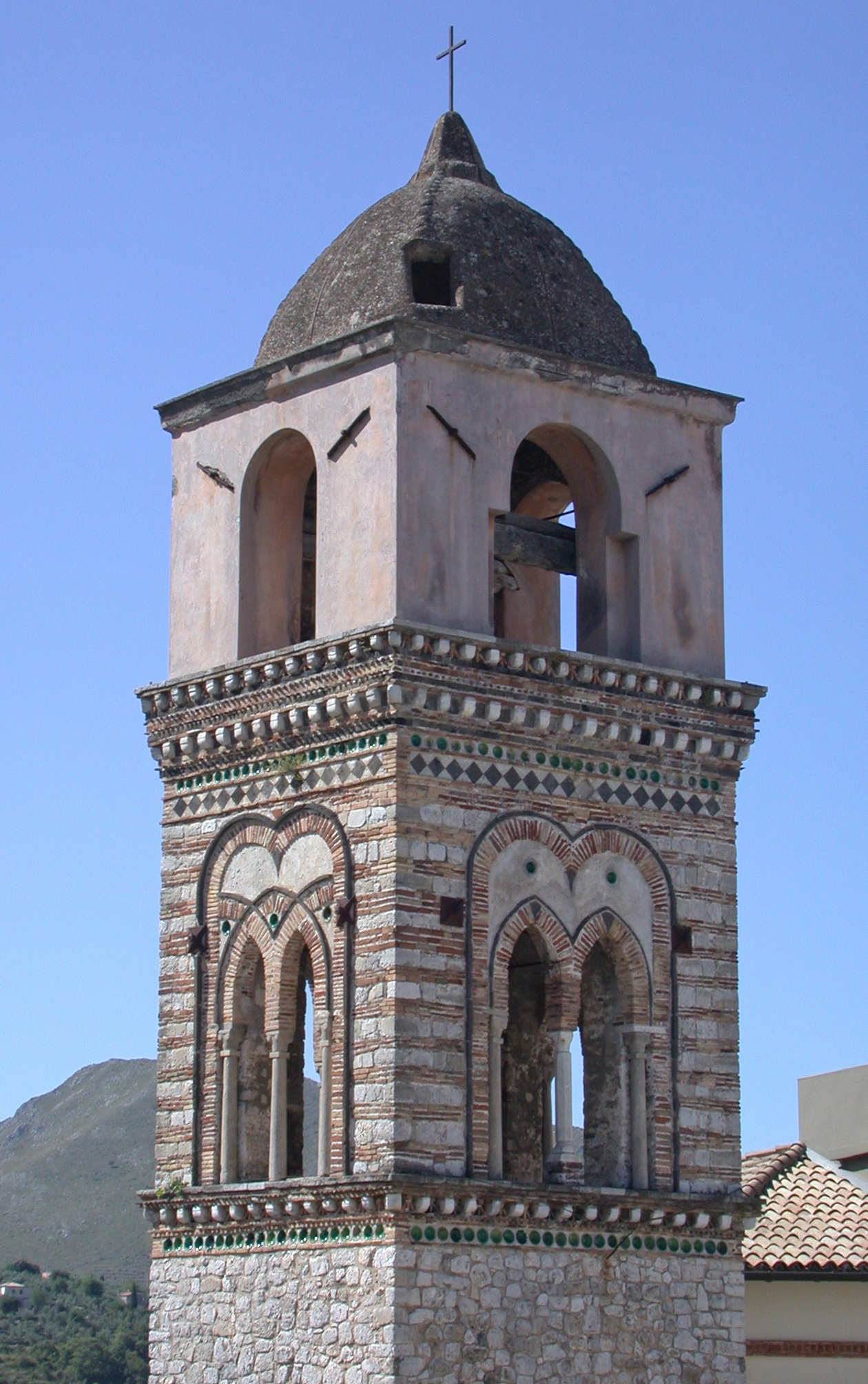 Itri, provincia di Latina, regione Lazio, Italia. Città alta, campanile della scomparsa chiesa di Santa Maria Maggiore (particolare parte superiore)